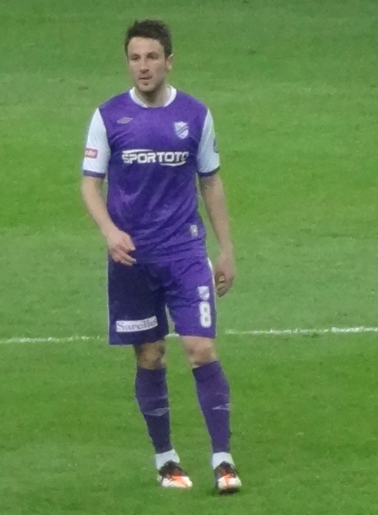 Ali Galatasaray maçında